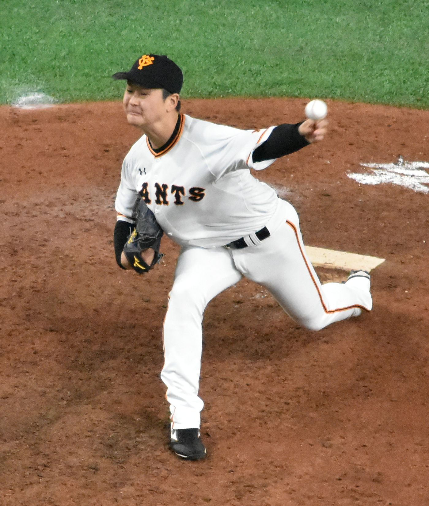 中川 皓太